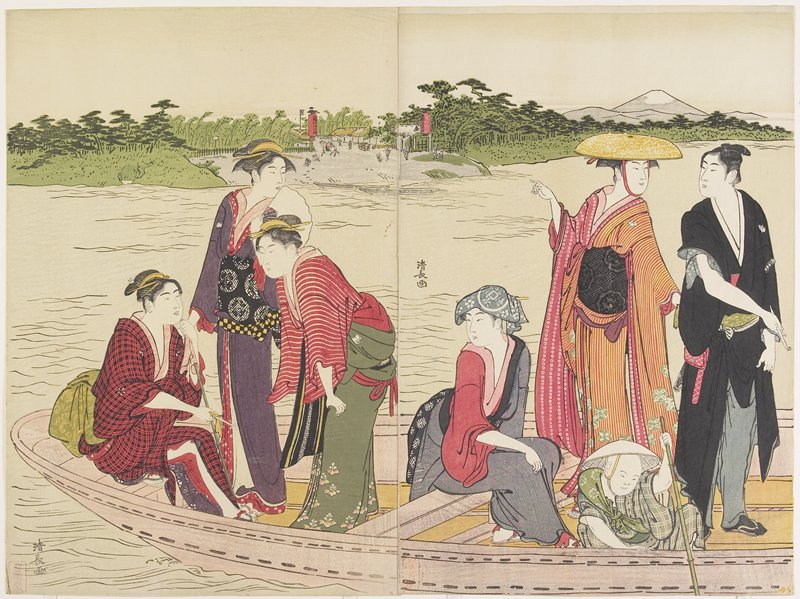 『六郷渡船』天明4年